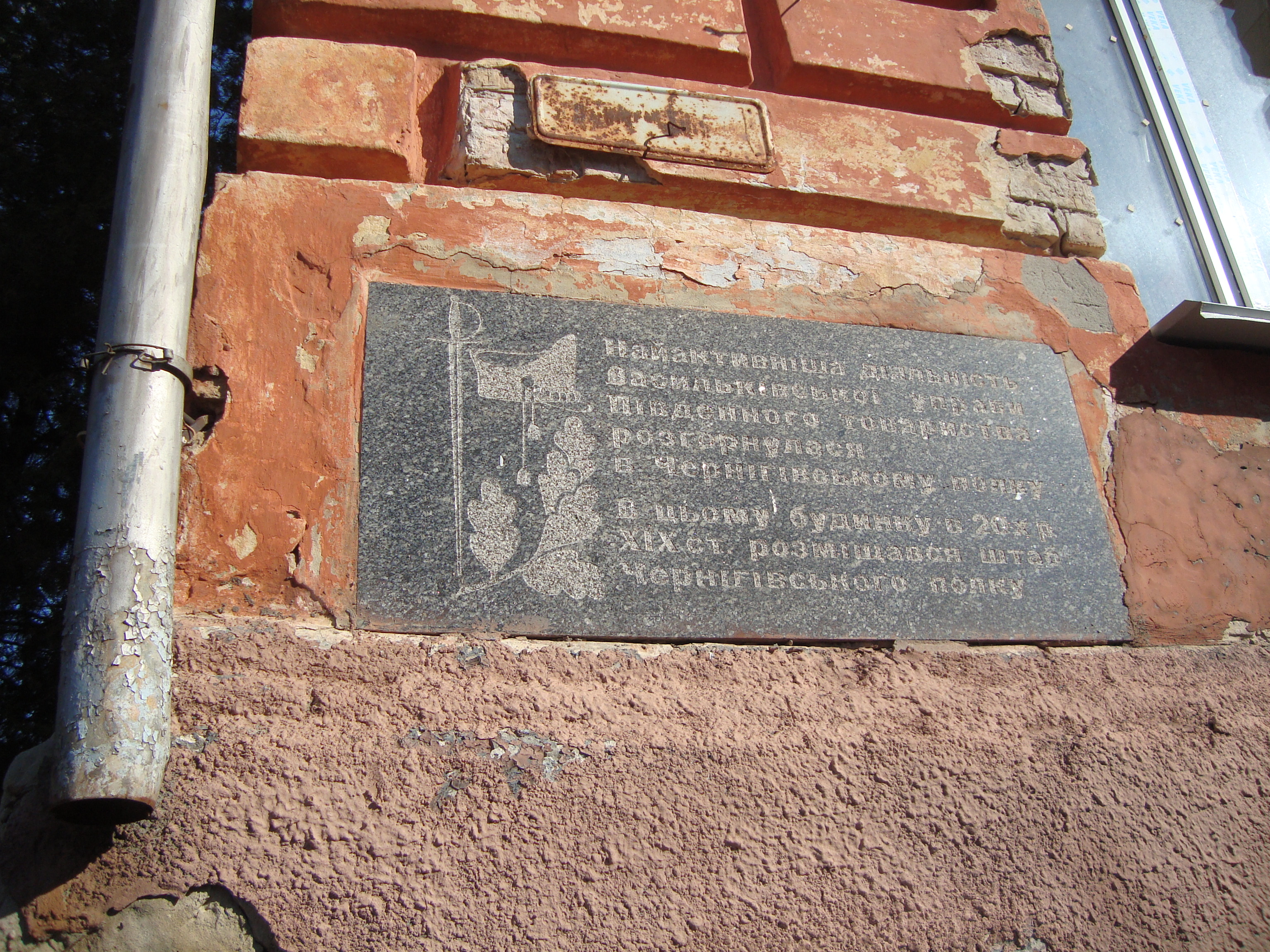 Повітові присутствені місця (мур.), Васильків, вул. Луначарського, 1